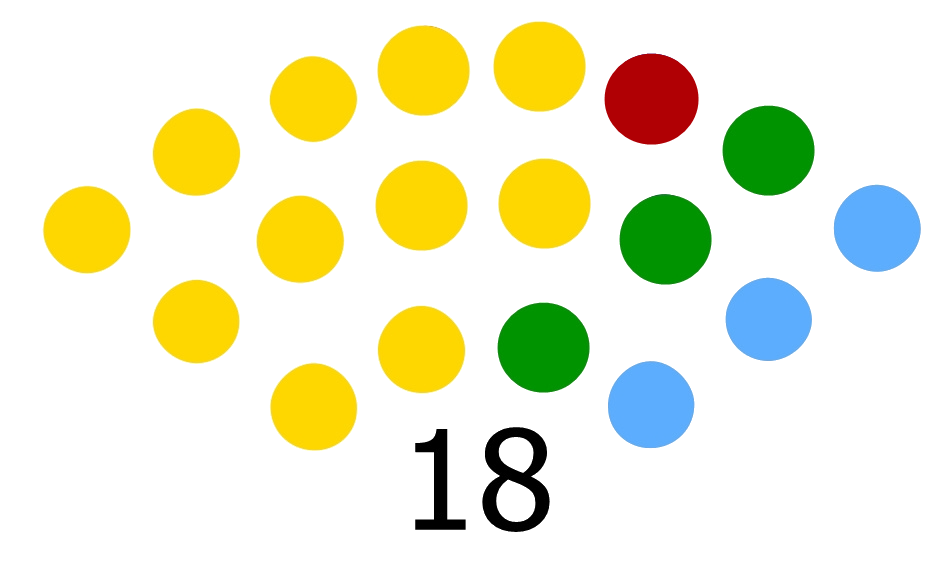 Honorable Concejo Deliberante de Coronel Rosales